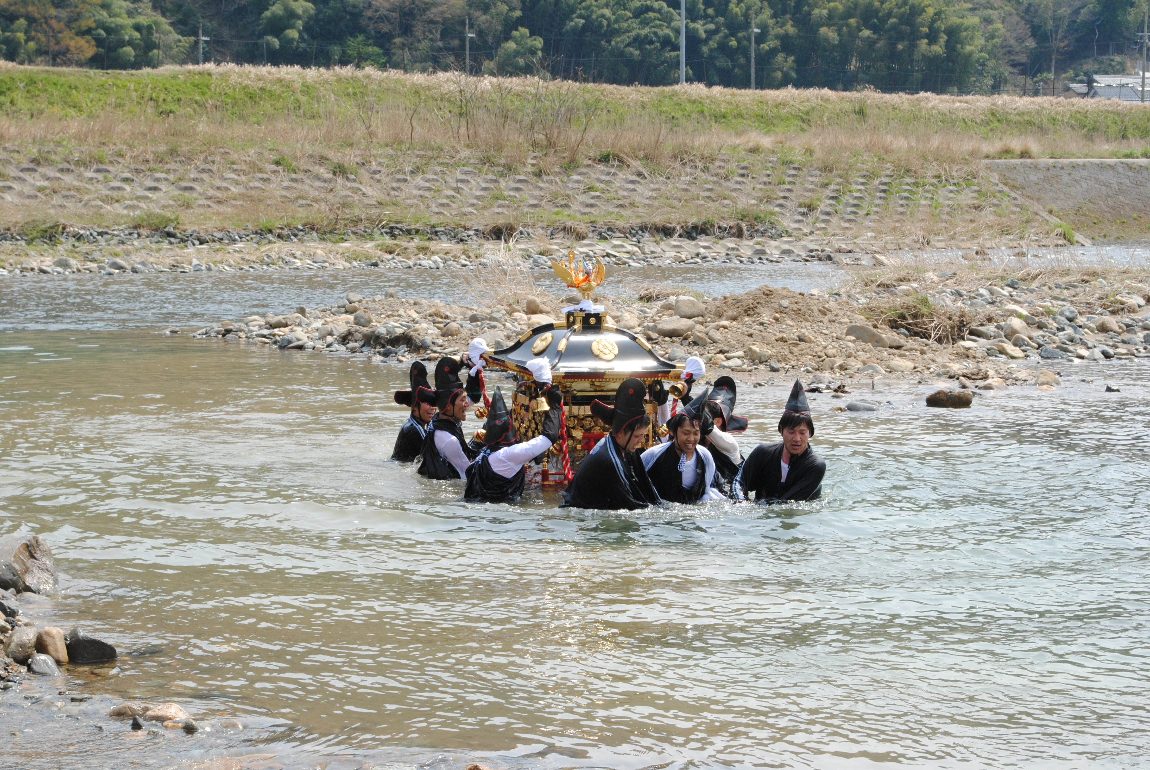 川渡御の様子